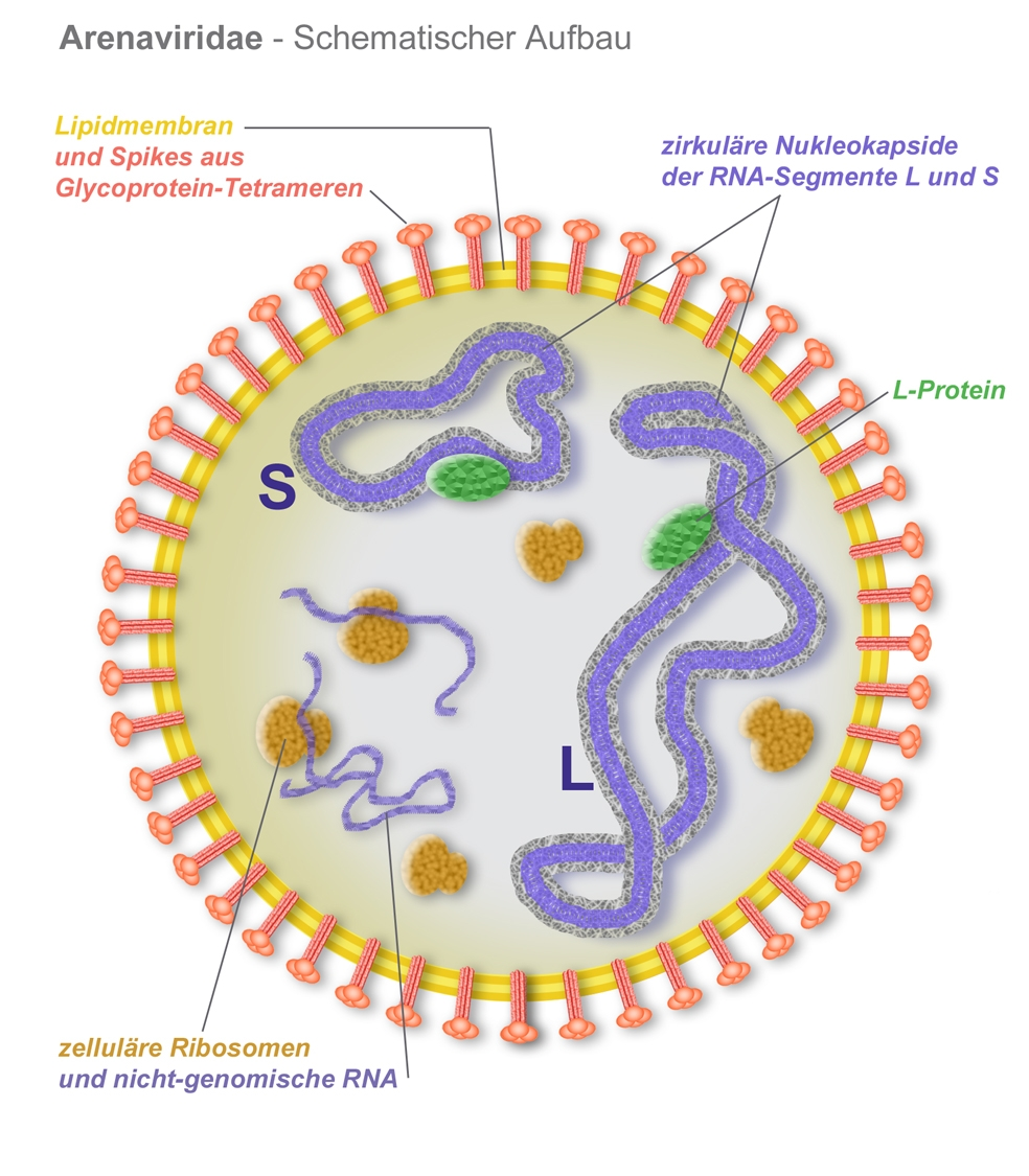 Schematischer Aufbau eines Arenavirus